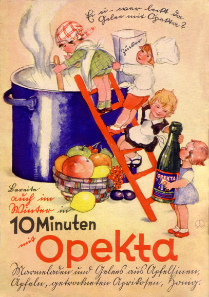 Ein über Jahre verwendetes Motiv mit der Sütterlin-Schrift, Anfang der 1930er Jahre, benutzt in Zeitschriften, Werbeprospekten, Rezeptheften oder auch als Blech-Reklameschild Transkribierter Text:"Ei ei - wer leckt da Gelee mit Opekta? - Zucker - Bereite auch im Winter in 10 Minuten mit Opekta - Marmeladen und Gelees aus Apfelsinen, Äpfeln, getrockneten Aprikosen, Honig."Dieses Motiv gab es später auch noch mit besser lesbarer Schrift, da die Nazis die Sütterlin ab 1941 verboten hatten.